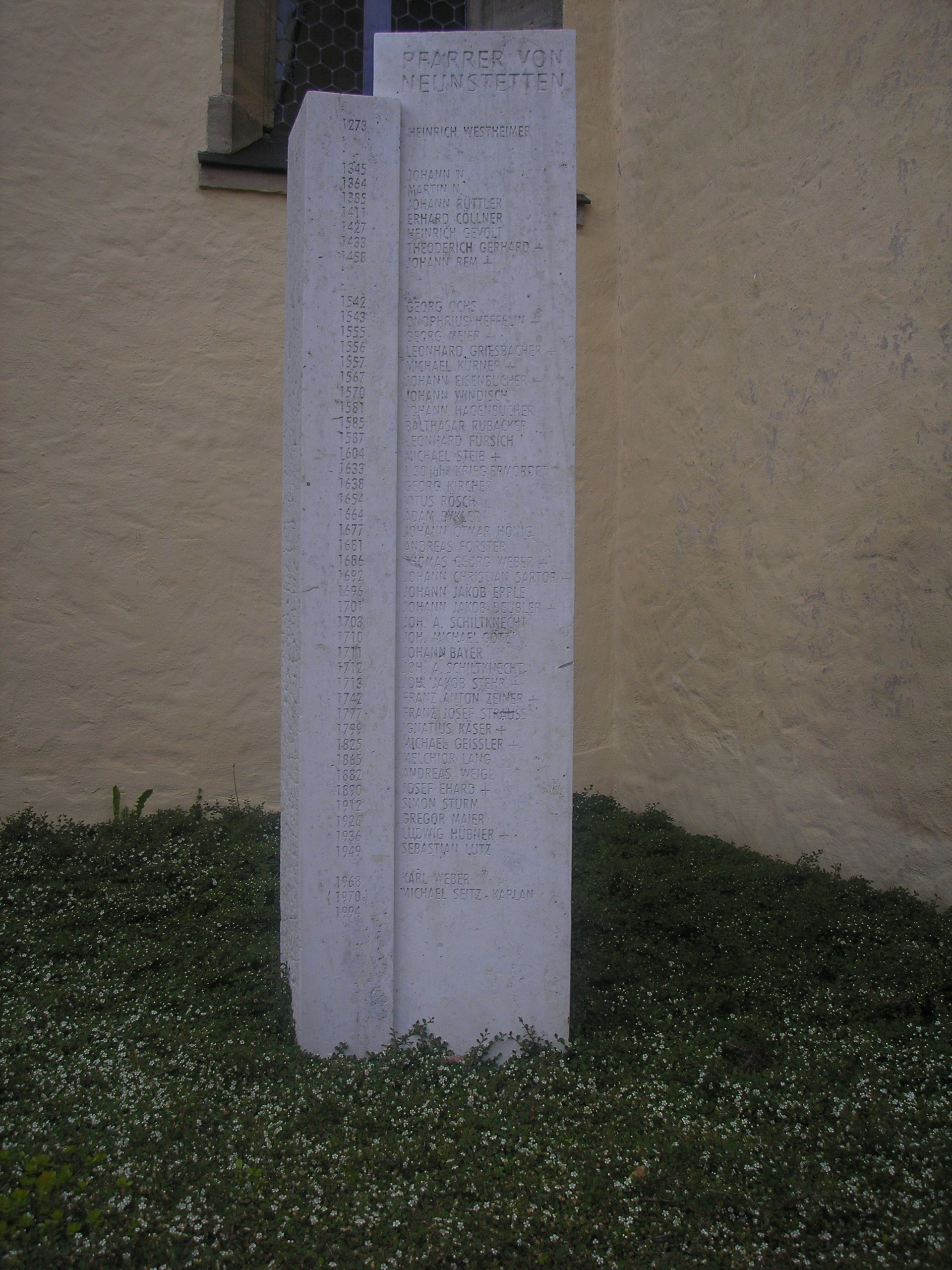 Stele rechts von Südeingang